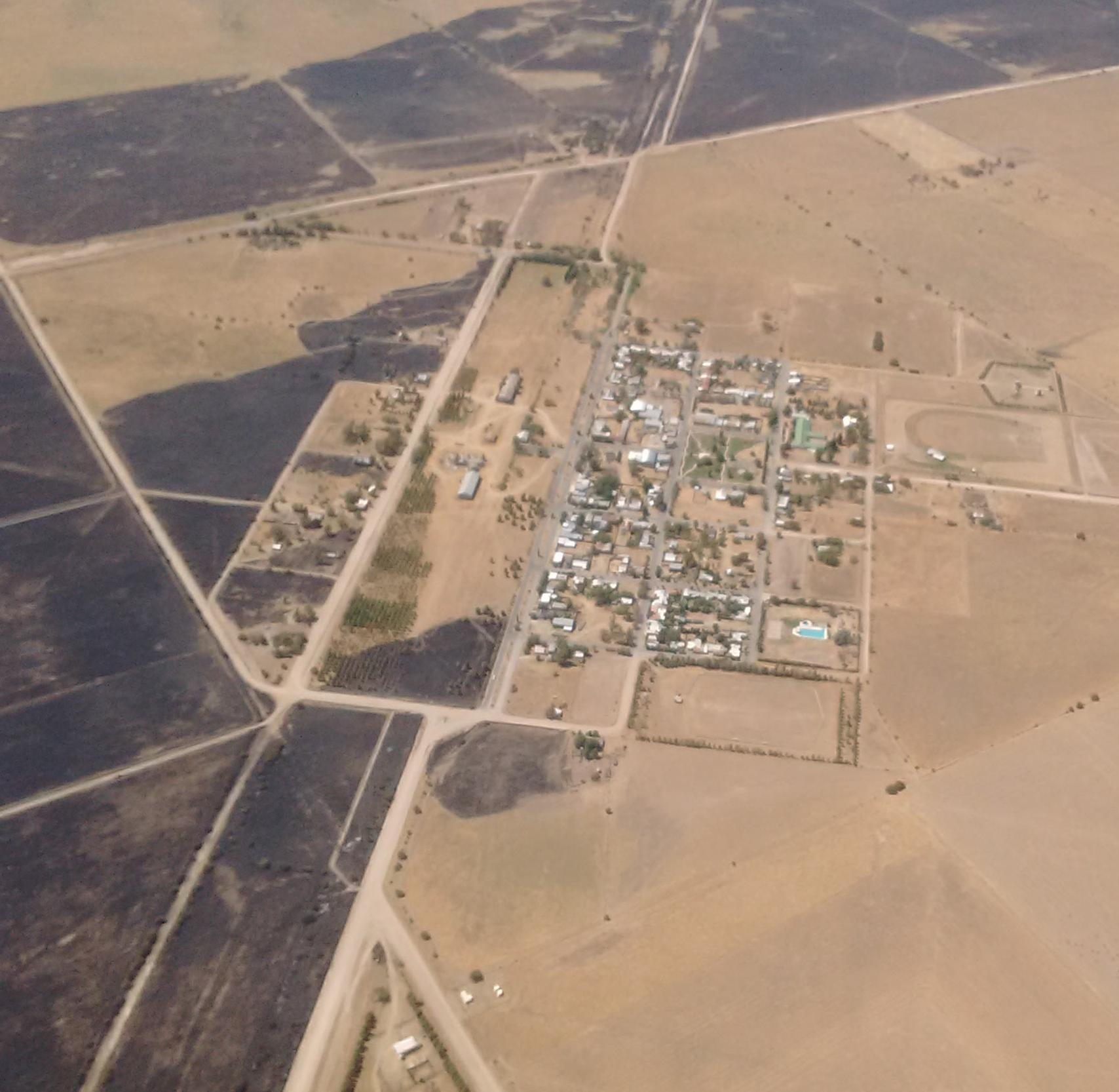 Vista aérea de Abramo, provincia de La Pampa, Argentina